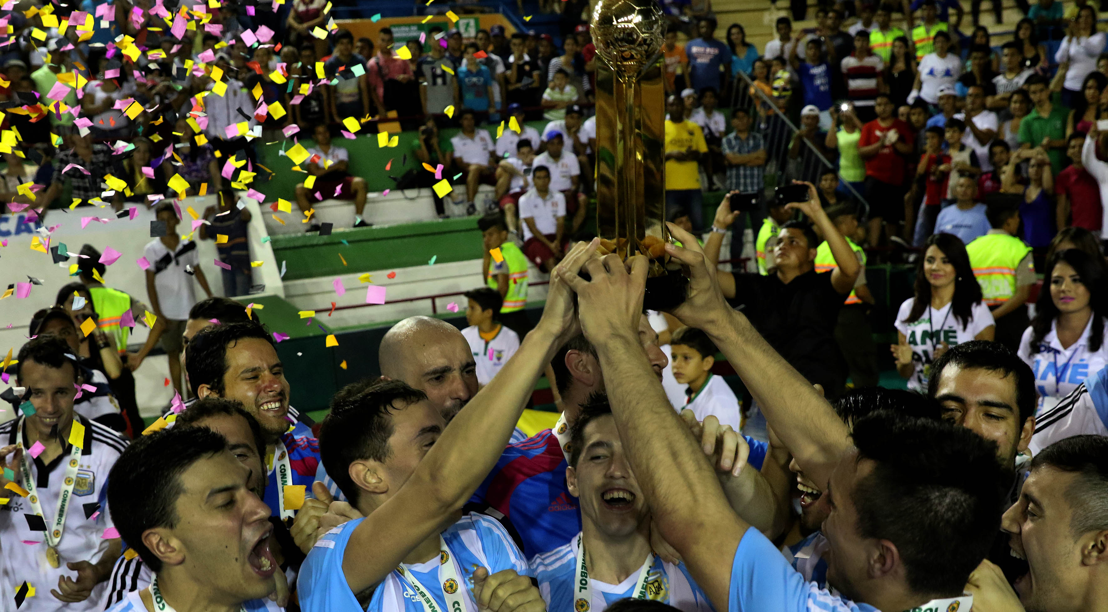 Portoviejo, Manabí, 30 de ago del 2015 (Andes).-La selección de Argentina se adjudicó el campeonato de la Copa América al derrotar 4x1 a la selección de Paraguay. Foto:César Muñoz/Andes